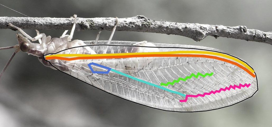 Italochrysa italica, Vorderflügel schwarz umrandet gelb: Subcosta; braun: Radius dunkelblau: Intramedianzelle aus Ästen MP1 und MP2 der Media Posteriorhellblau:Pseudomedia grün: Innere und pink: Äußere Gradatenreihe (Zickzackader)